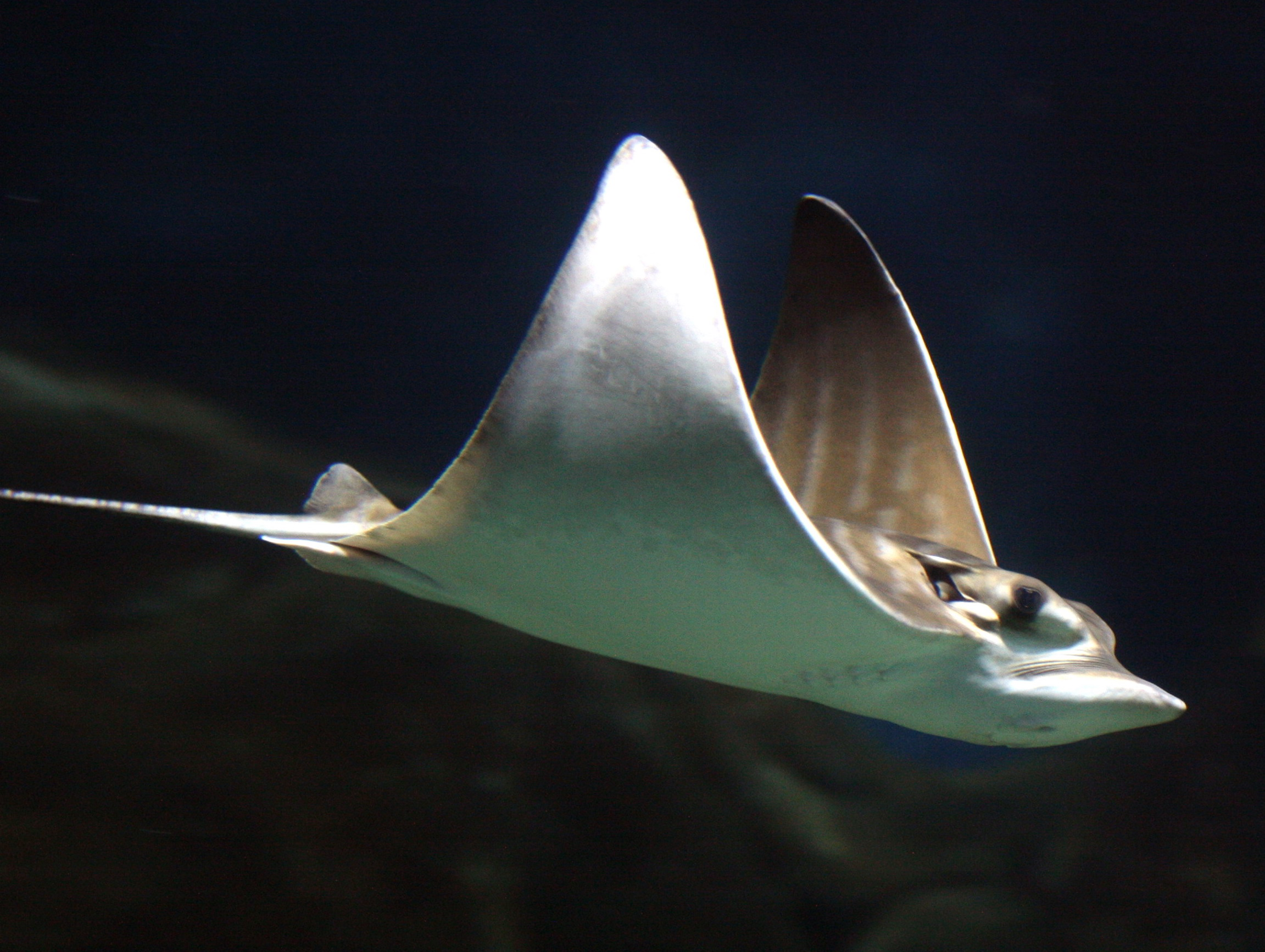 Bull ray (Pteromylaeus bovinus) at the Ciudad de las Artes y las Ciencias. Valencia.